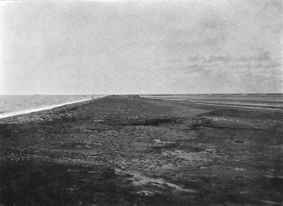 Место высадки английской армии 2 сентября 1854 г Книга "Виды полей сражений Крымcкой кампании 1854 - 1855 гг. По фотографиям полковника В.Н. Клембовского" — СПб.: Экспедиция заготовления государственных бумаг, 1904.